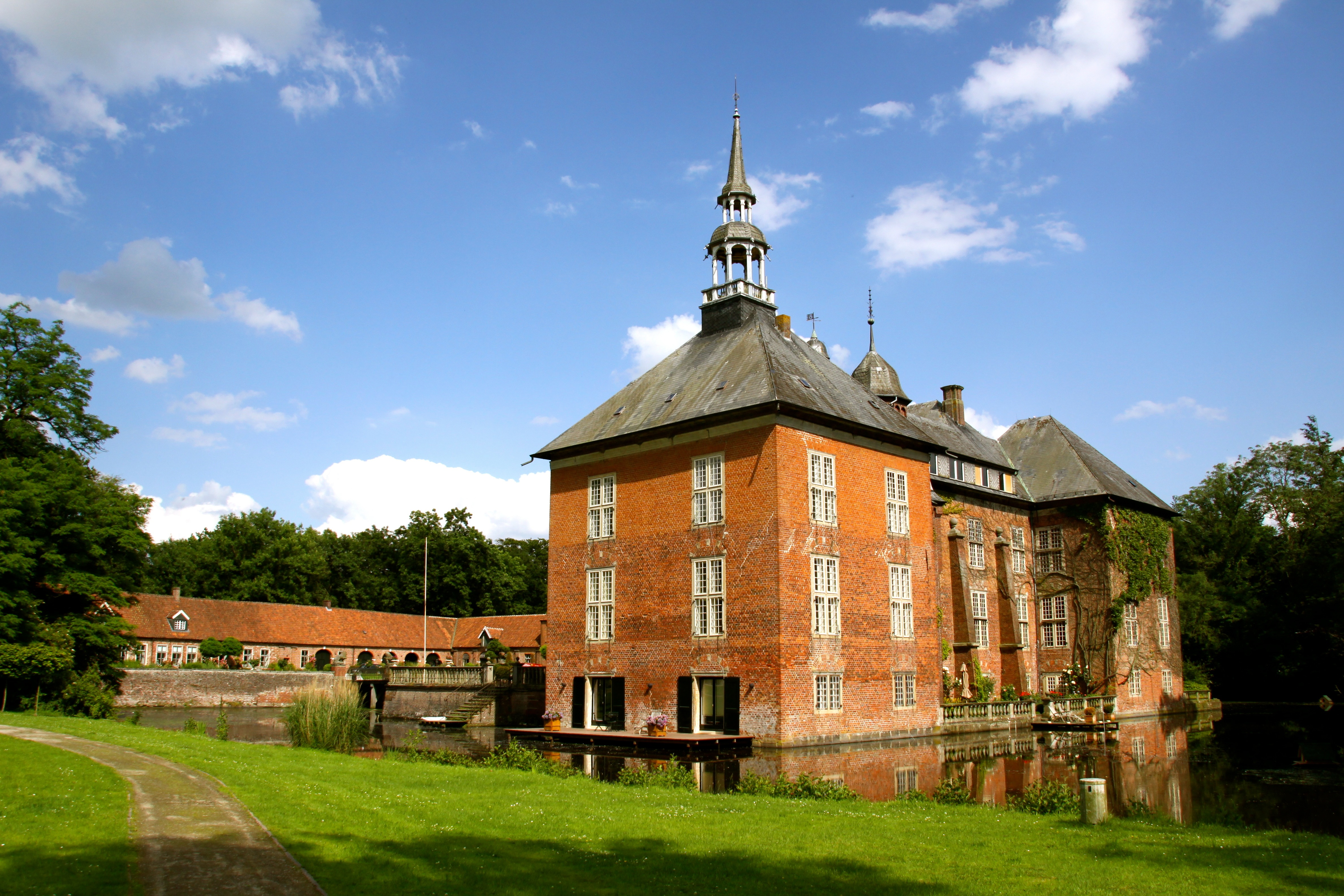 Schloss Gödens Ansicht vom Garten